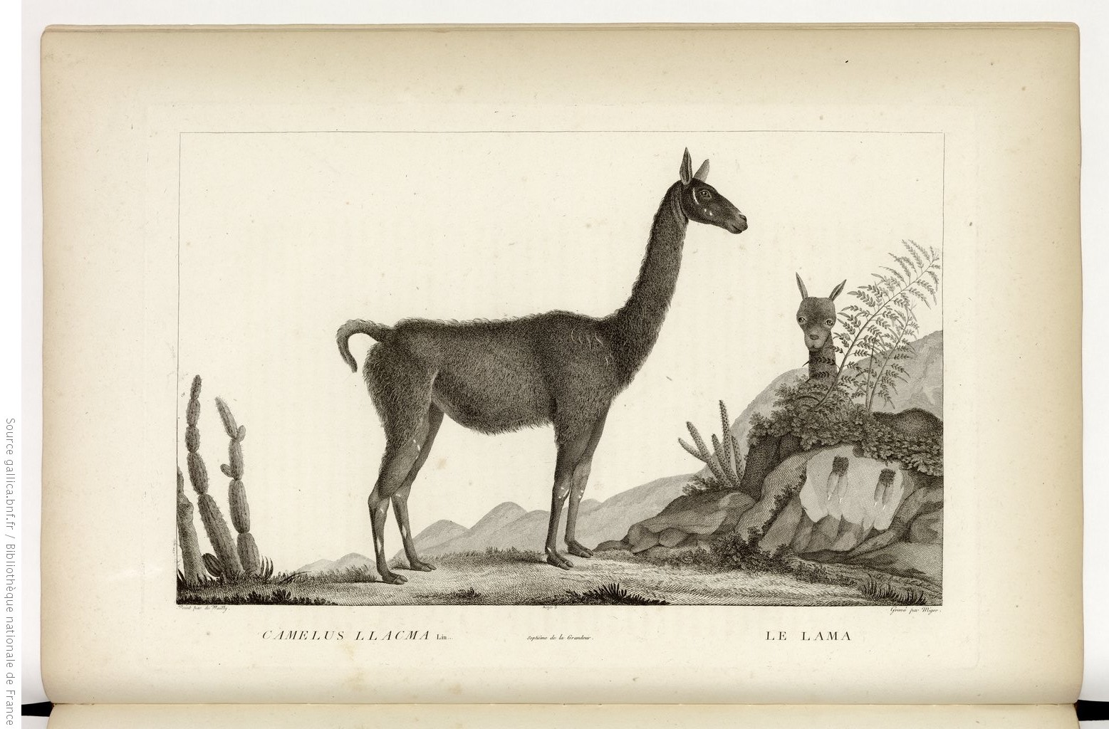 "Le Lama". Planche gravée par Simon Charles Miger d'après Léon de Wailly, tiré de Étienne de Lacépède, Georges Cuvier, Étienne Geoffroy Saint-Hilaire, "La ménagerie du Muséum national d'histoire naturelle, ou Les animaux vivants...", Paris, 1801.